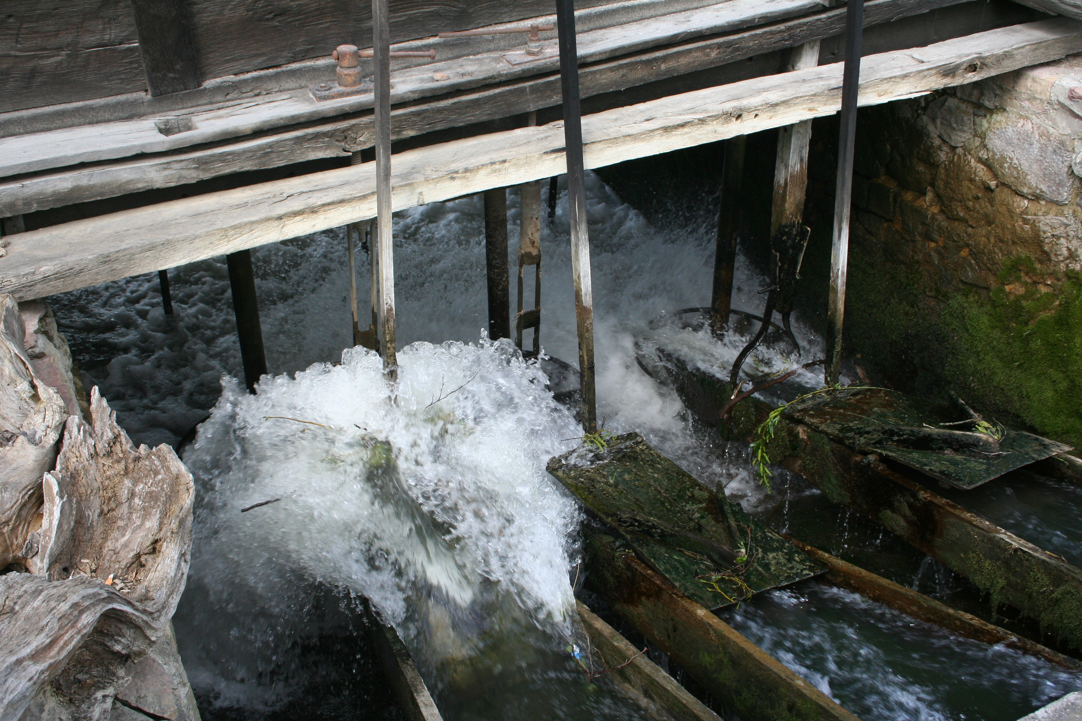 Kumova vodenica u Markovoj Crkvi